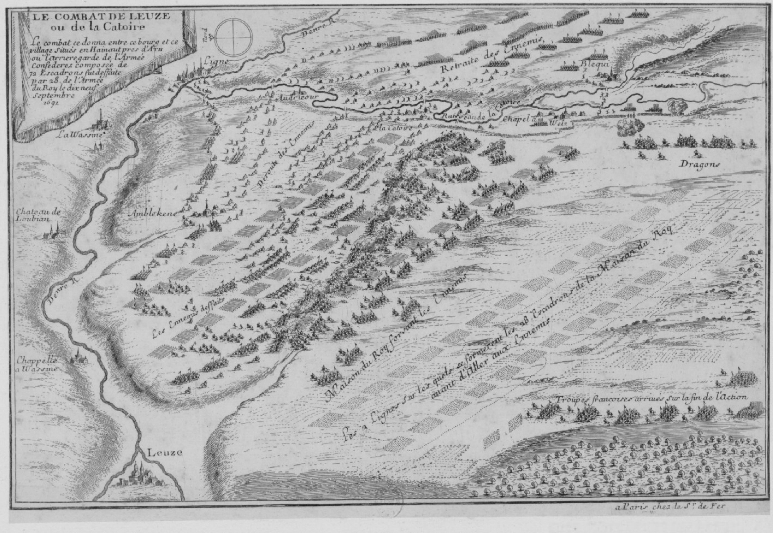 Bataille de Leuze 18 septembre 1691